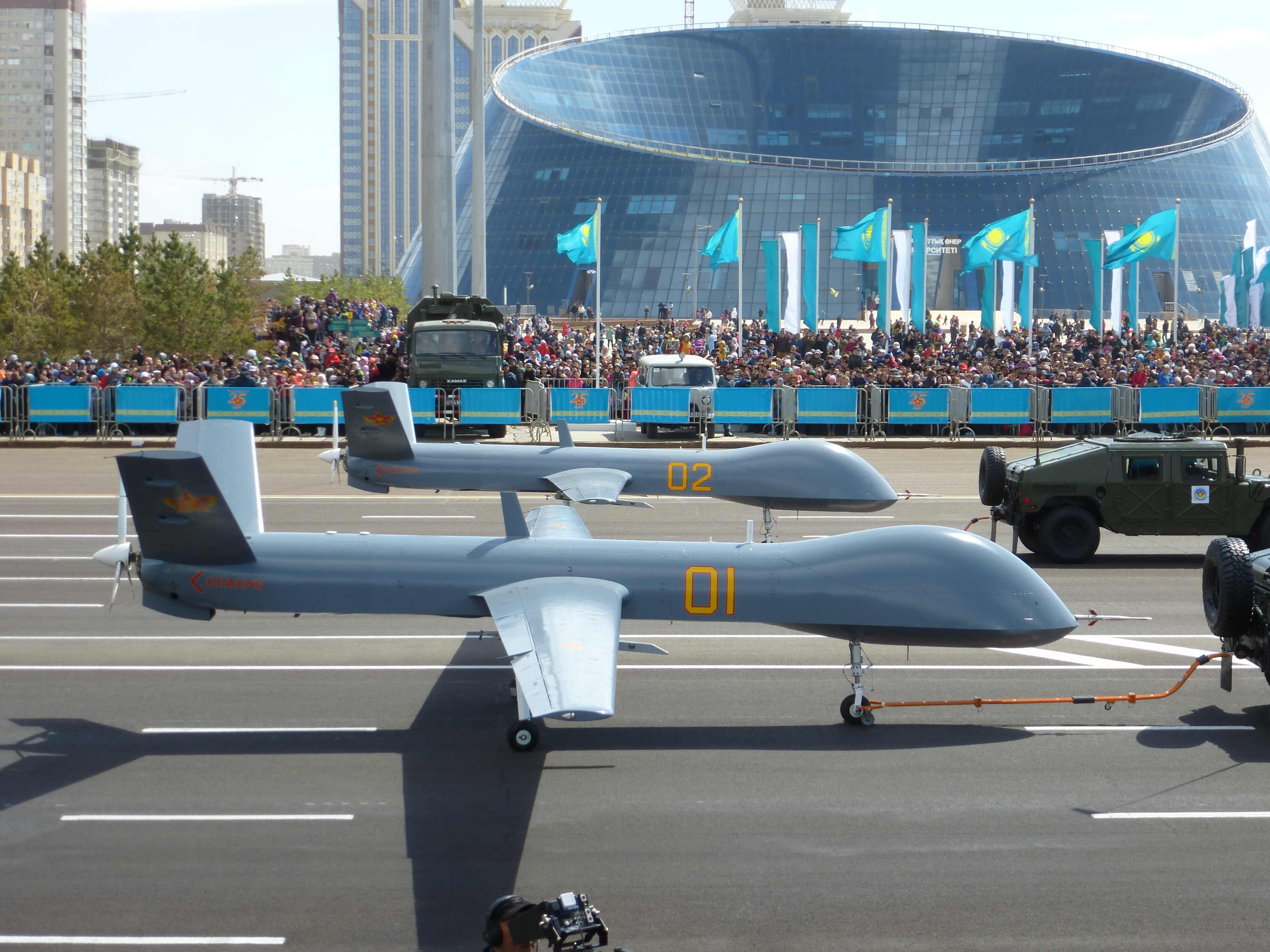 БПЛА Wing Loong на военном параде в Астане. 7.05.2017